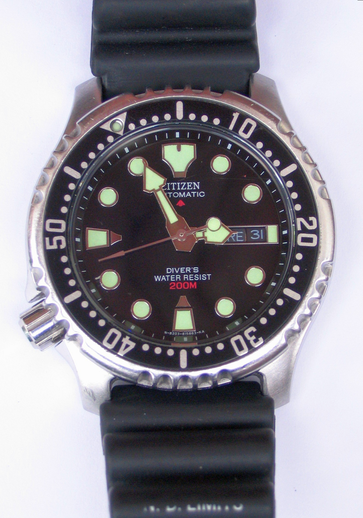 Taucheruhr